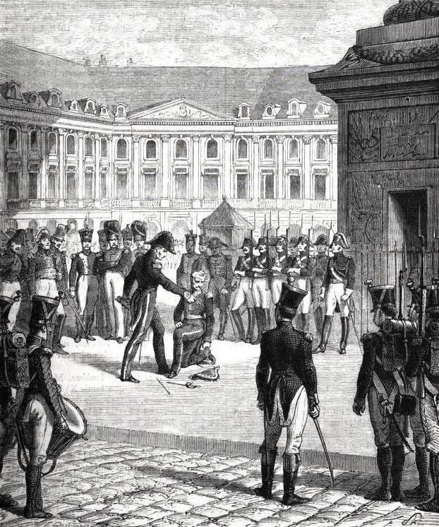 Dégradation du général Bonnaire (8 juin 1816)